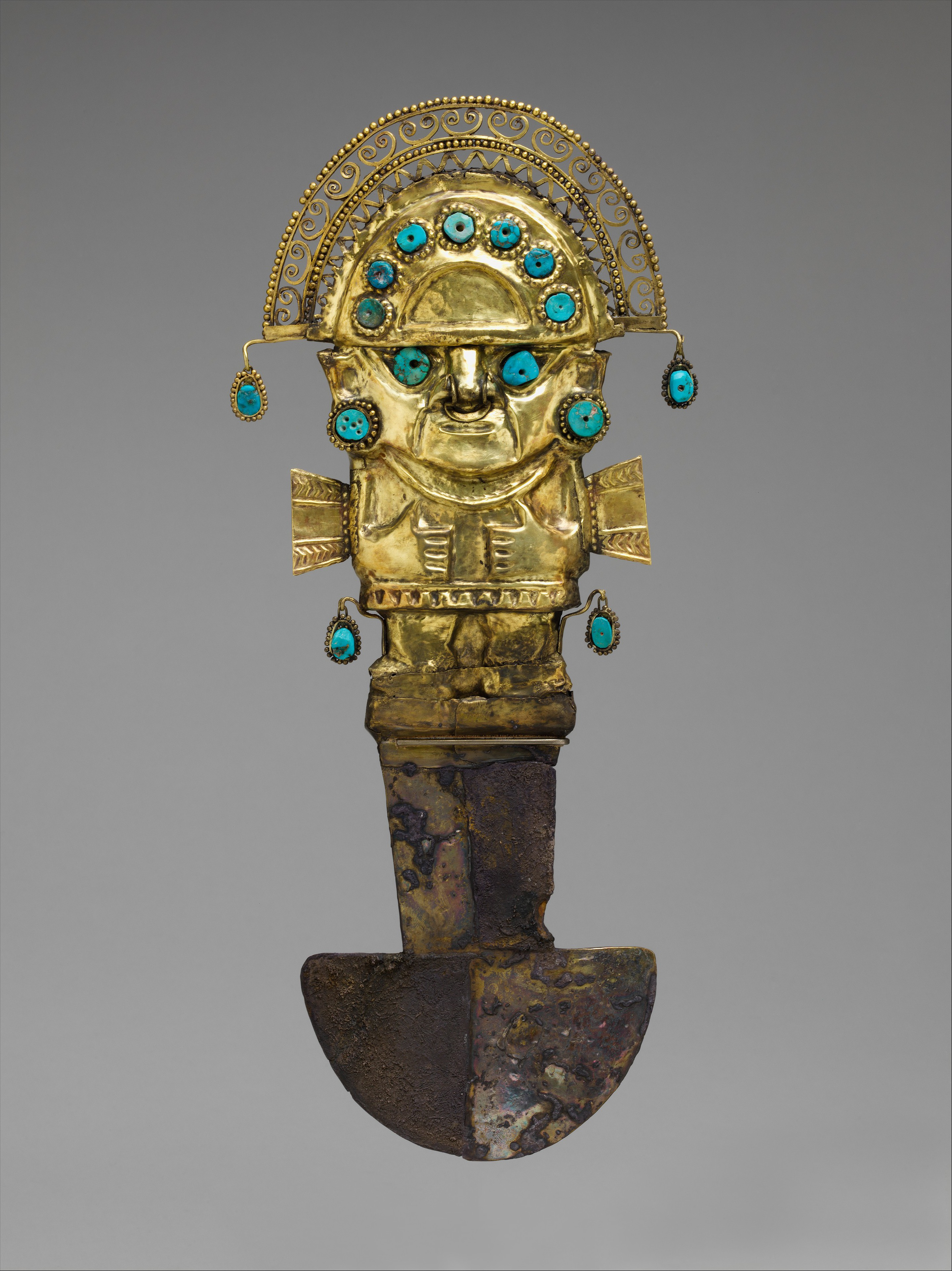 Lambayeque (Sicán); Knife; Metal-Implements